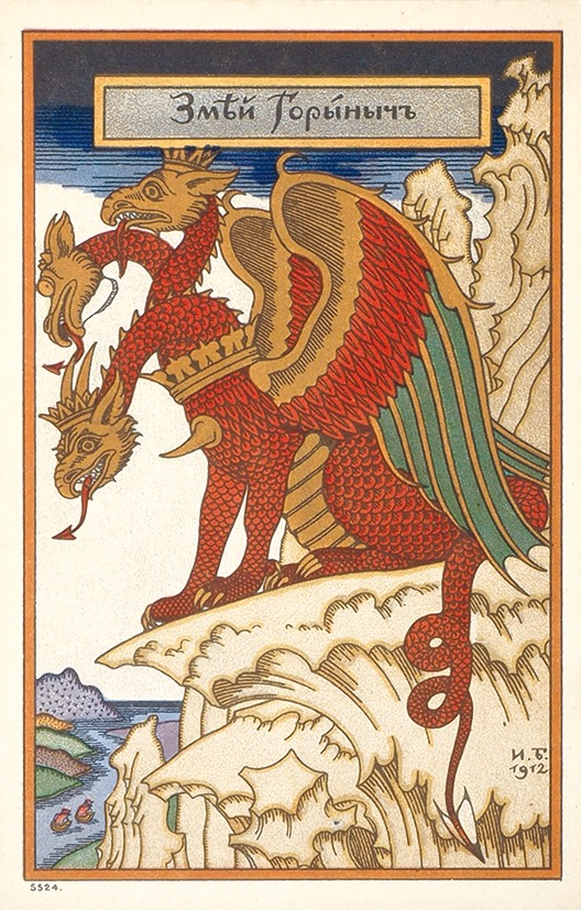 Змей Горыныч. 1912. Открытка издания "Общины св. Евгении".